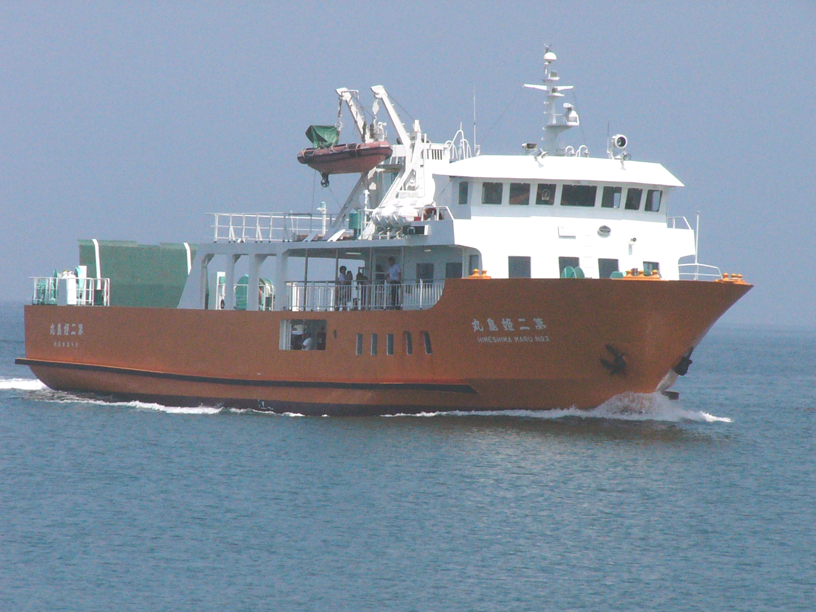 伊美に入港する第二姫島丸